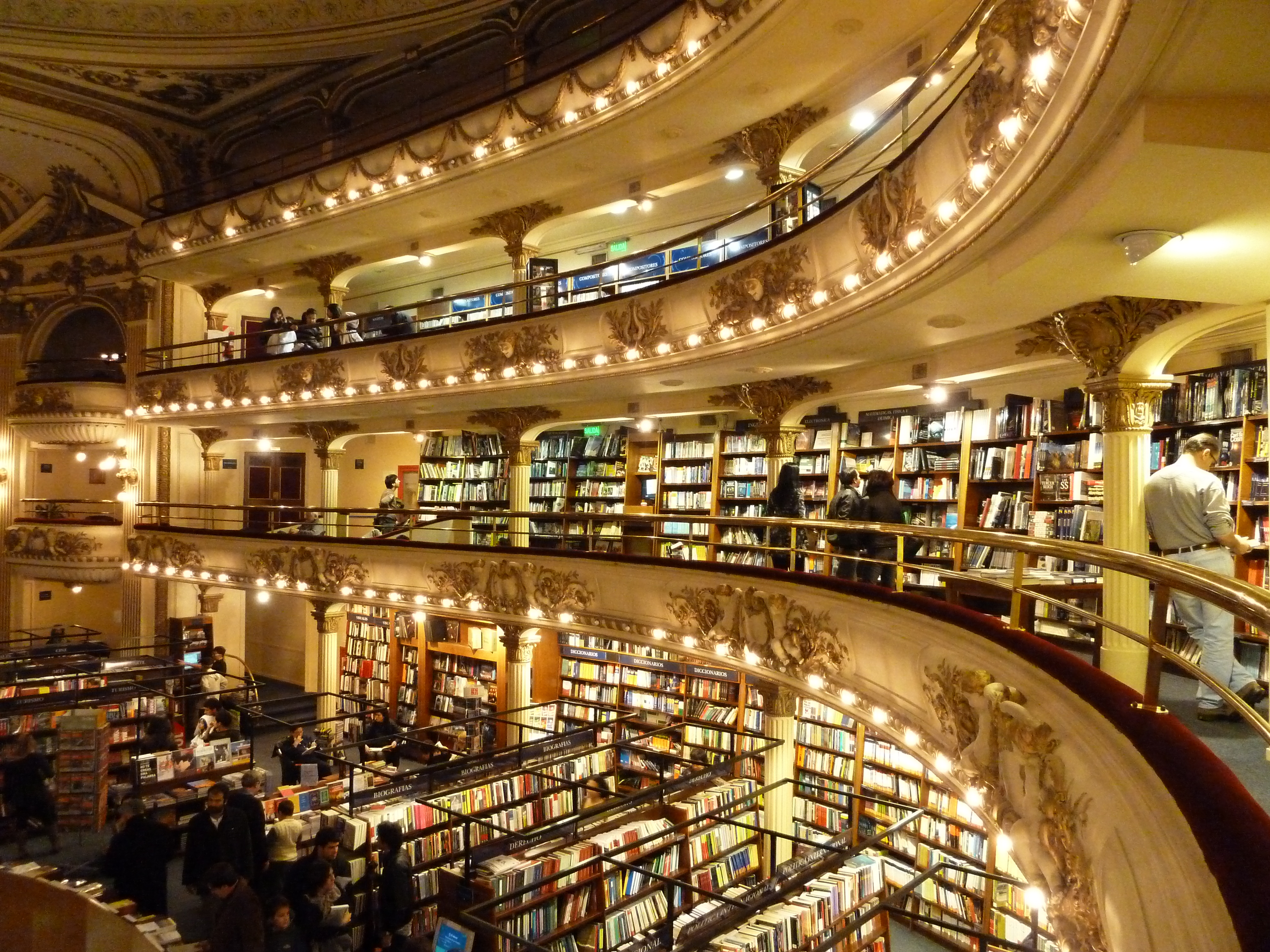 Cine Teatro Splendid